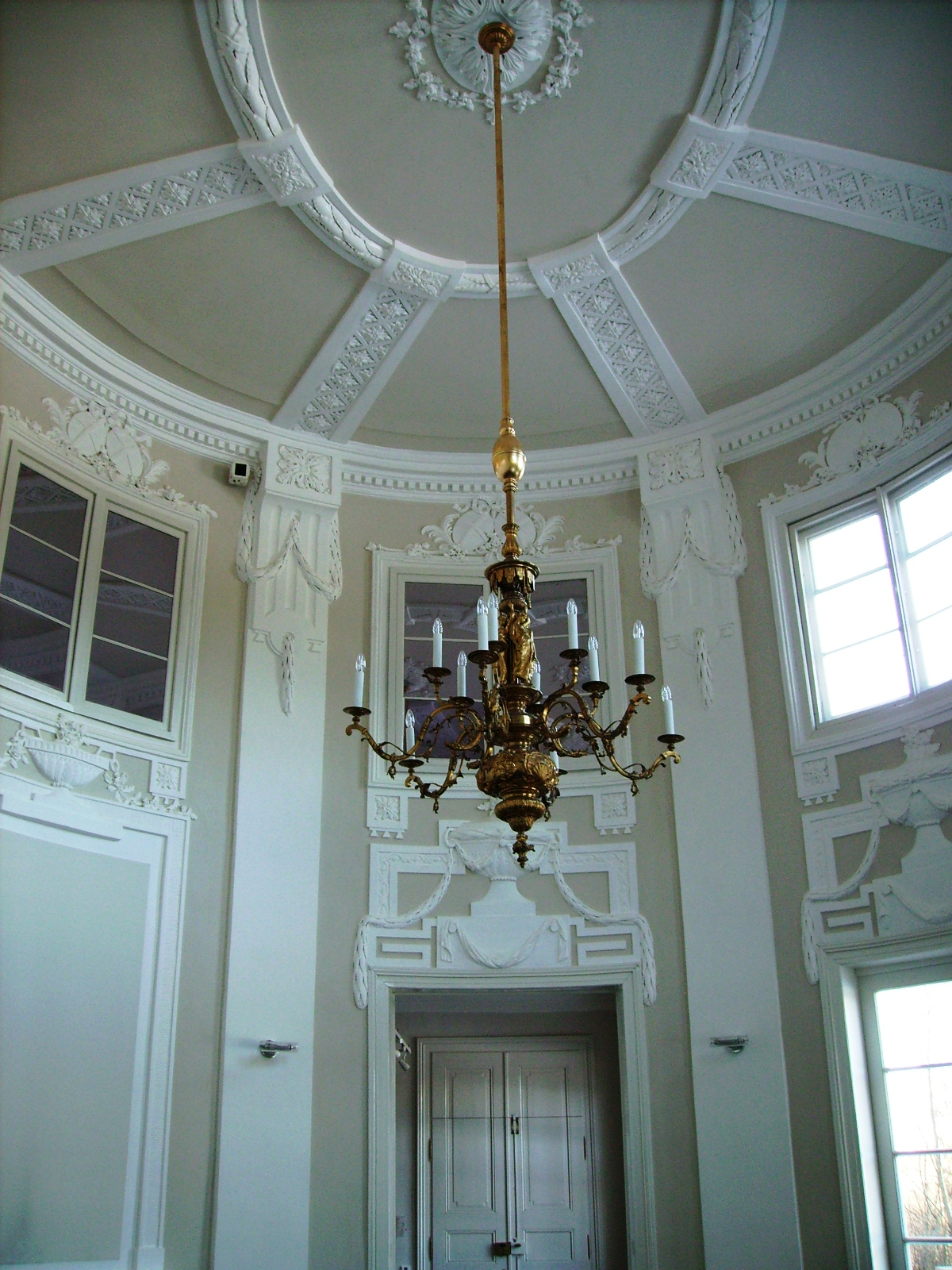 Villa Eugenia, Hechingen: Rotunde, Innenaufnahme